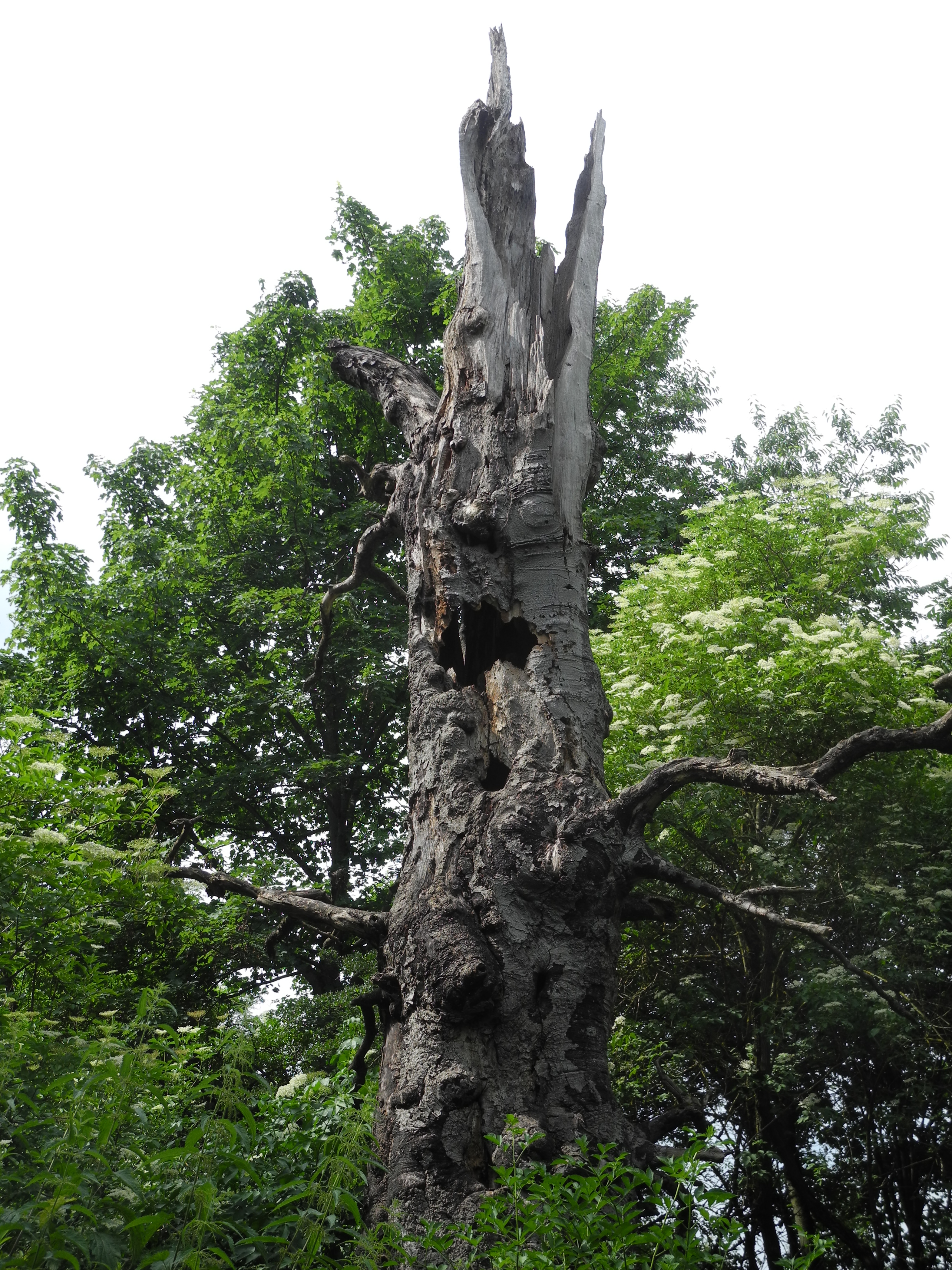 Naturdenkmal im Landkreis Kassel 6.33.304. Eichen- und Buchengruppe aus Stieleichen (Quercus robur) und Rotbuchen (Fagus sylvatica) im Habichtswald, südöstlich von Dörnberg. Eine Rotbuche als Totholz.